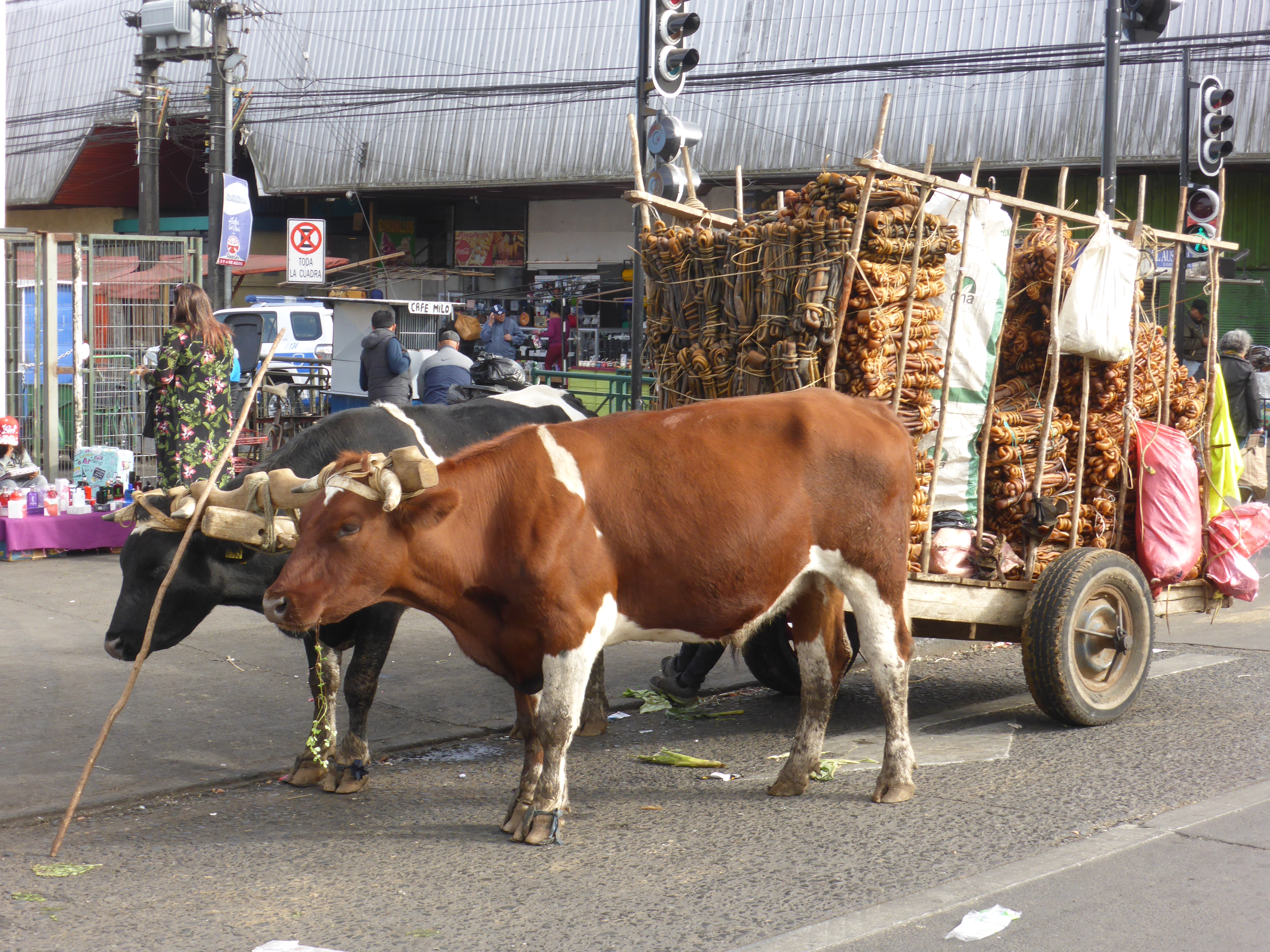 Carreta para vender el alga parda comestible llamada cochayuyo (nombre científico Durvillaea antarctica).